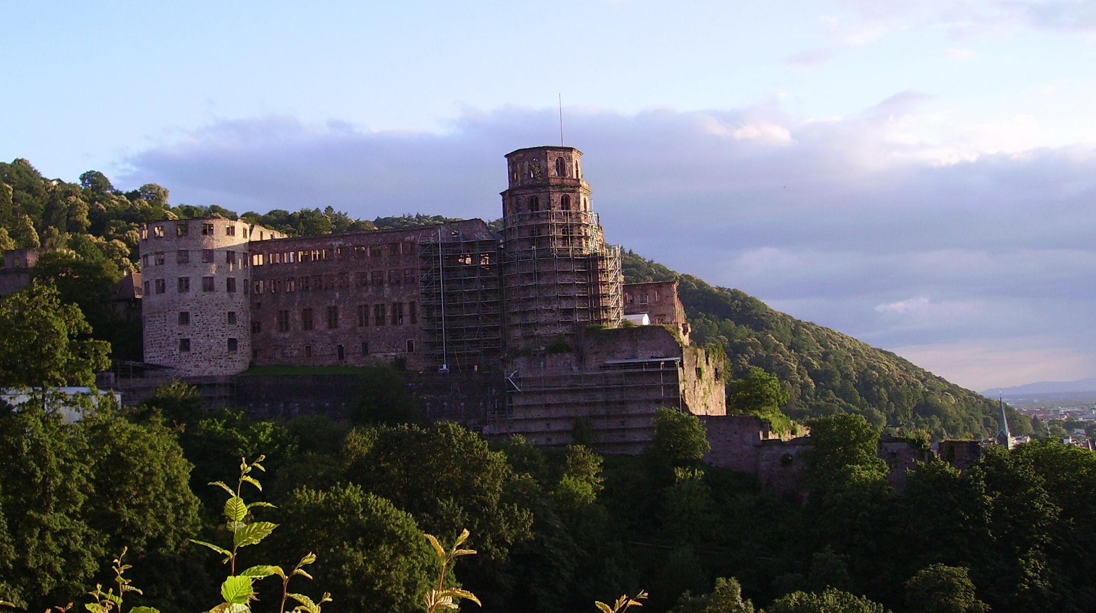 view of Heidelberg Castle